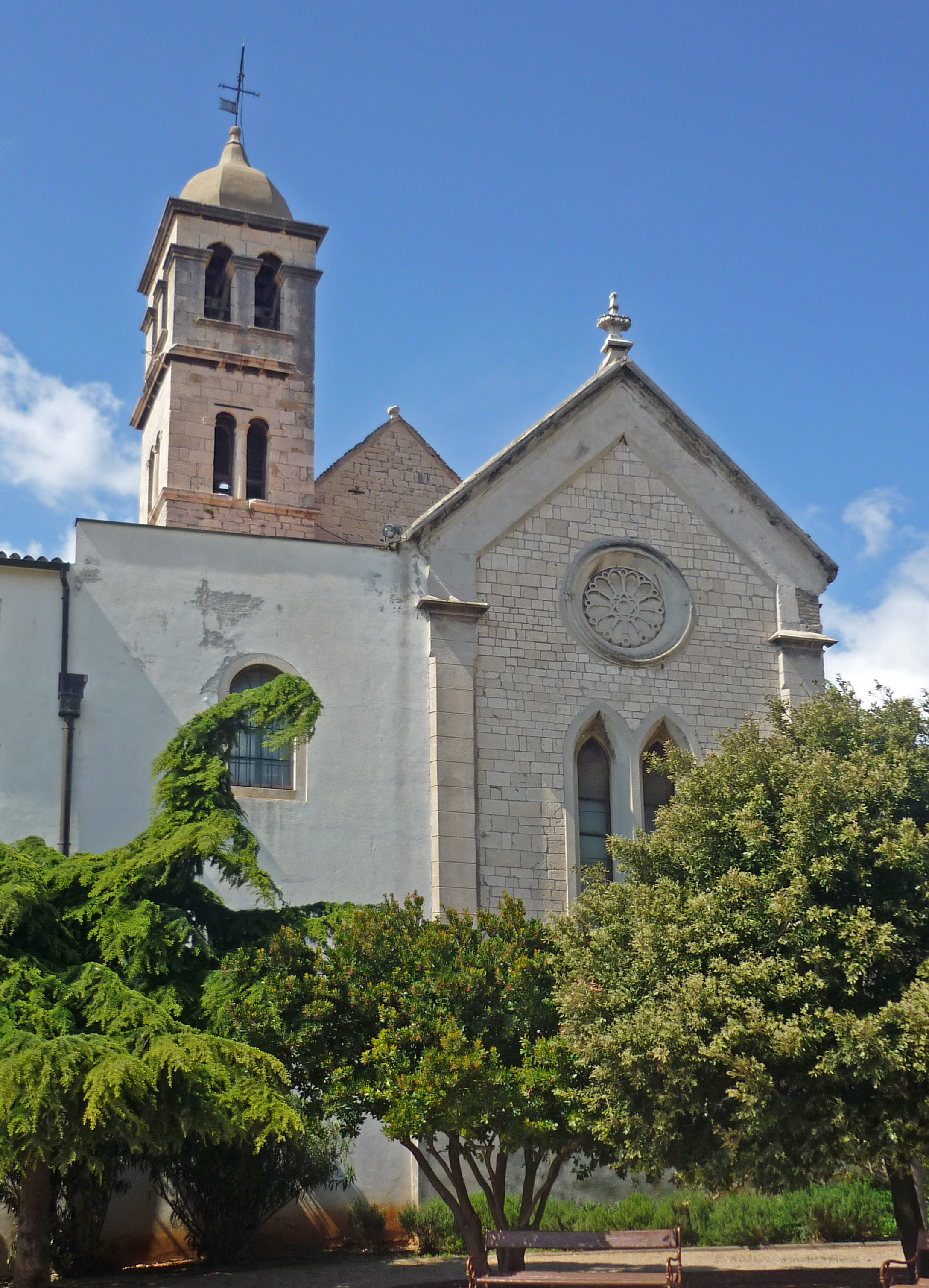 Franziskanerkloster in Šibenik (dt.: Sibenning, ital.: Sebenico)